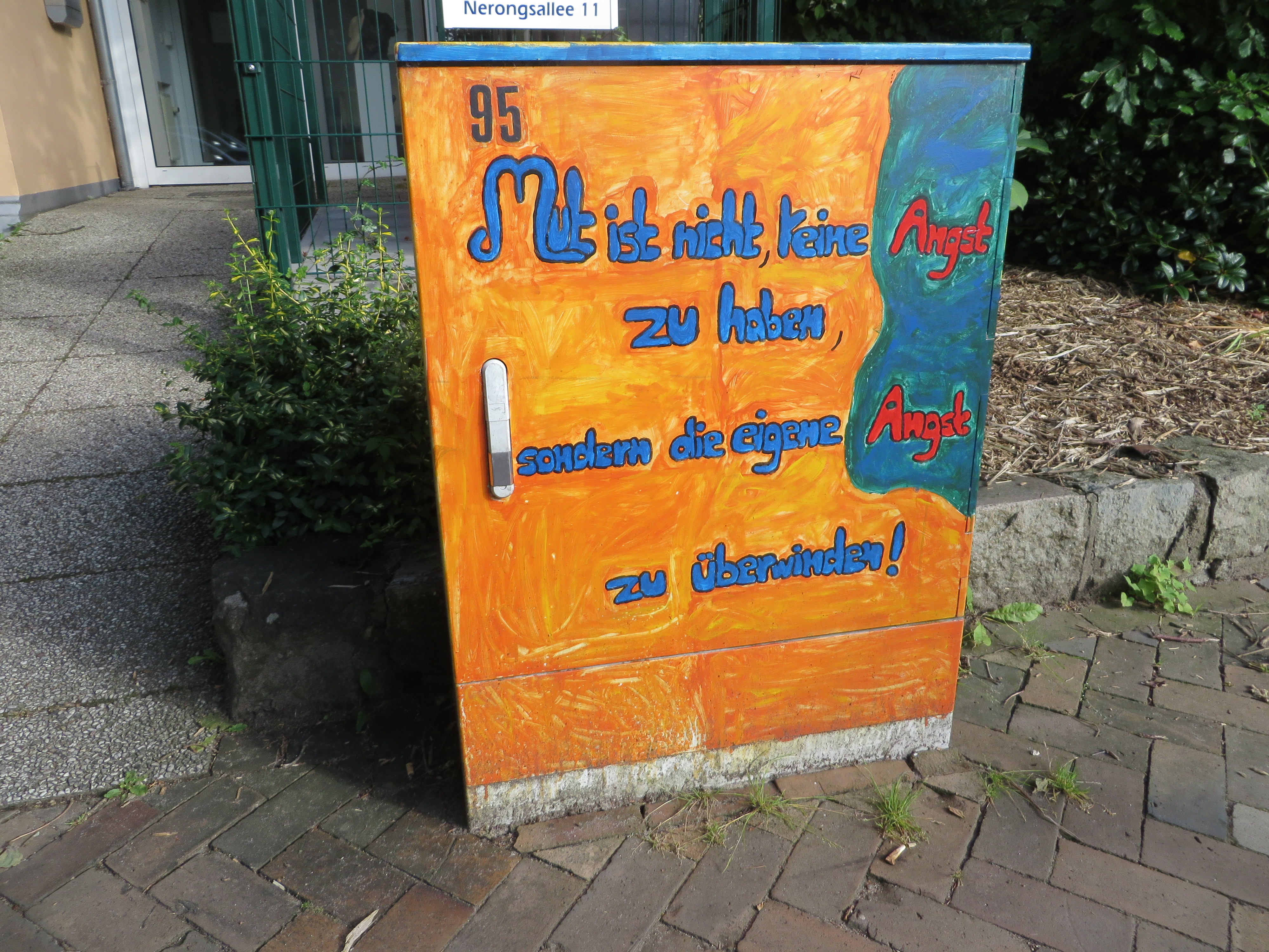 Stromkasten Nerongsallee 11, Mut und Angst (Flensburg 2015); steht vor eine Arztpraxis bestehend aus einer Praxisgemeinschaft; der Kasten in seiner Gestalt entstand im Rahmen des Projektes Stromfarben vom Kinder- und Jugendtreff die exxe